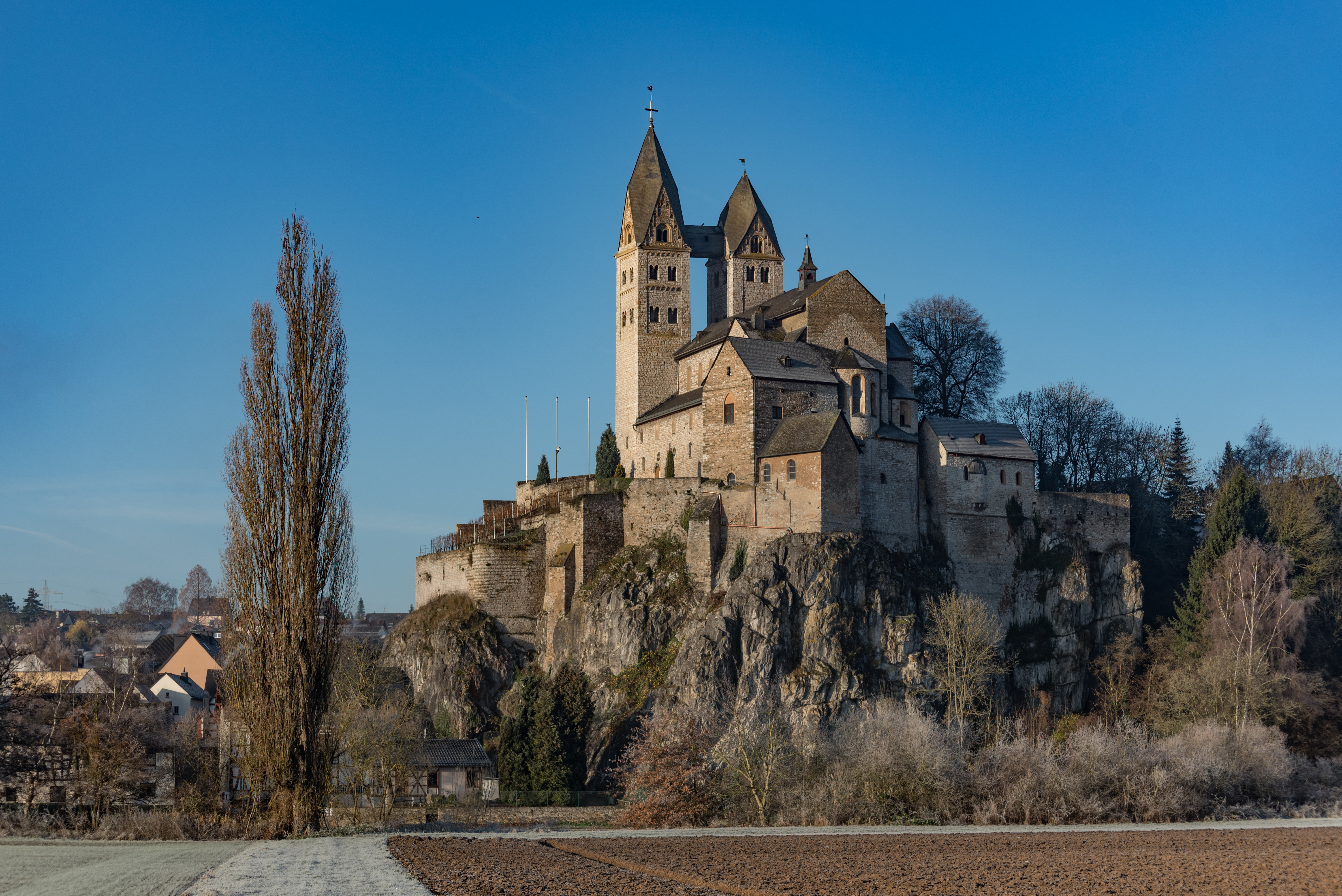 Limburg an der Lahn, Dietkirchen, St. Lubentius, von Südosten